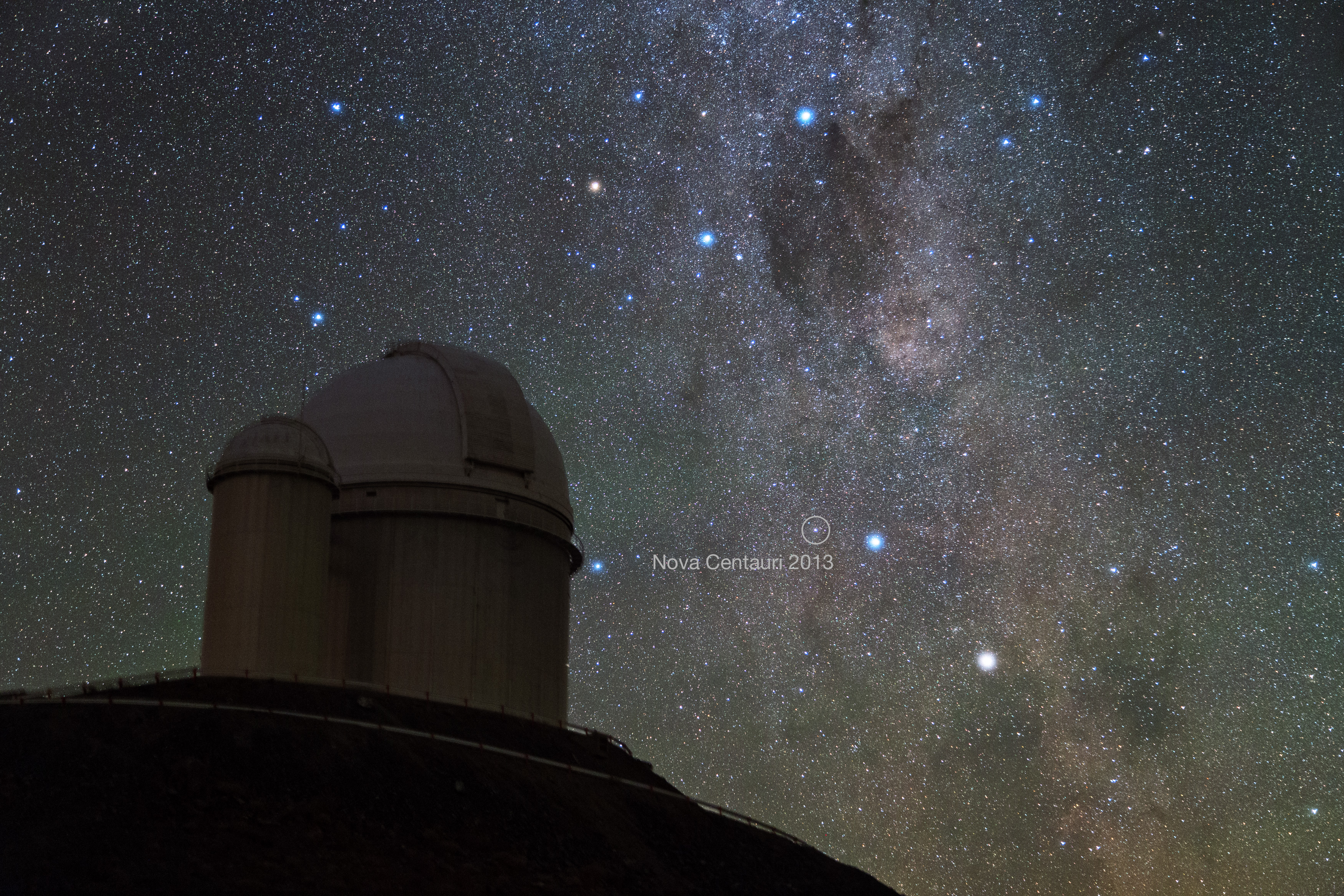 У Альфы и Беты Центавра, двух ярчайших звезд южного неба, теперь появился компаньон — видимая невооруженным глазом Новая Центавра 2013. Этот снимок сделан фото-посланником ESO (ESO Photo Ambassador) Юрием Белецким в обсерватории ESO Ла Силья (La Silla Observatory) в чилийской пустыне Атакама ранним утром в понедельник 9 декабря 2013 г. Новая звезда была открыта Джоном Сичем (John Seach) из Австралии 2 декабря 2013 г., когда ее яркость приближалась к уровню, доступному для невооруженного глаза. Новая Центавра 2013 – самая яркая новая из всех, которые появлялись в этом тысячелетии. Данное астрономическое событие принадлежит к разряду классических новых, и его не следует путать с вспышкой сверхновой. Классическая новая появляется в системе двойной звезды, в которой водород из звезды-спутника аккрецирует на поверхность главной звезды. Это ведет к неконтролируемому термоядерному взрыву, резко повышающему яркость главной звезды. Но в случае классической новой звезда не разрушается, как при вспышке сверхновой, а лишь сбрасывает внешний поверхностный слой вещества -- оболочку. На снимке новая видна слева от Беты Центавра, более голубой и более высоко расположенной из двух ярких звезд в левой нижней части изображения. Южный Крест и Туманность Угольный Мешок тоже видны в верхней части фото. На переднем плане слева – 3.6-метровый телескоп ESO, введенный в строй в 1976 году. Сейчас он работает со спектрографом HARPS, самым продуктивным охотником за экзопланетами на Земле. Ла Силья, расположенная в 600 км к северу от Сантьяго, на высоте в 2400 м над уровнем моря на краю чилийской пустыни Атакама, когда-то была первой обсерваторией ESO в Чили, крупнейшей обсерваторией своего времени.